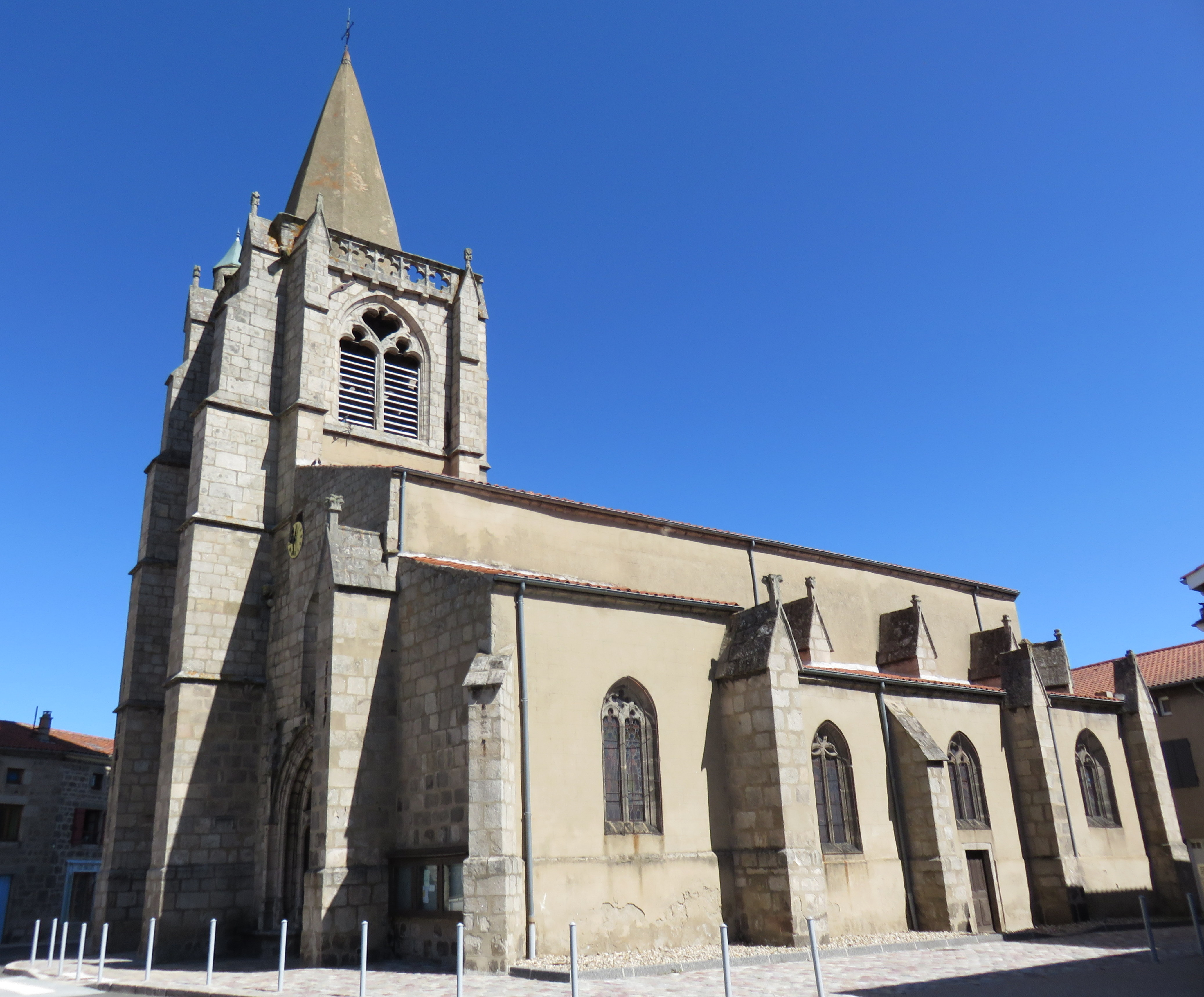 Église Saint-Jean-Baptiste de Périgneux, inscrite MH, dans le département de la Loire.